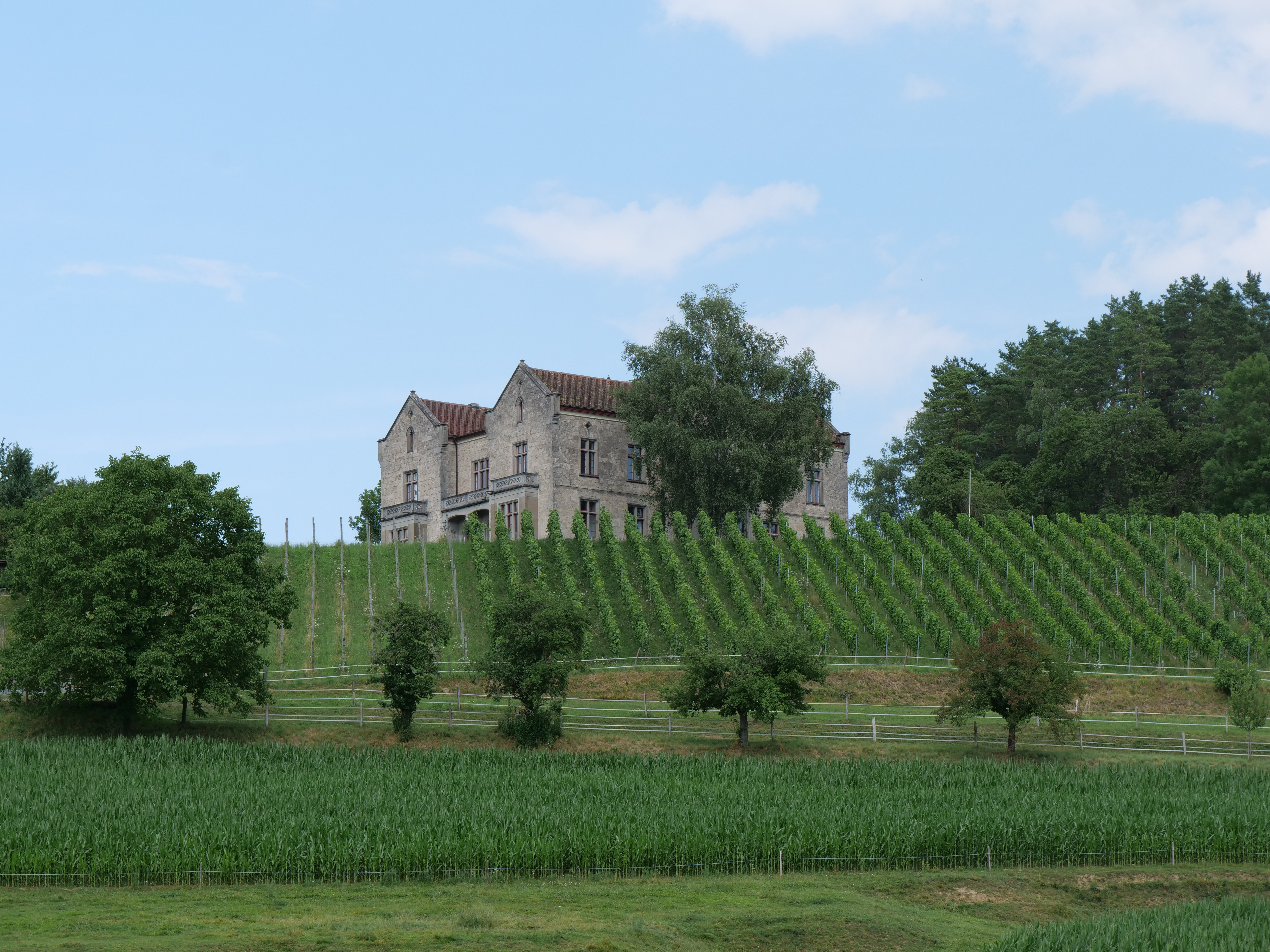 Neues Schloss Teufen von 1850, gebaut nach Plänen des Zürcher Architekten Leonhard Zeugheer